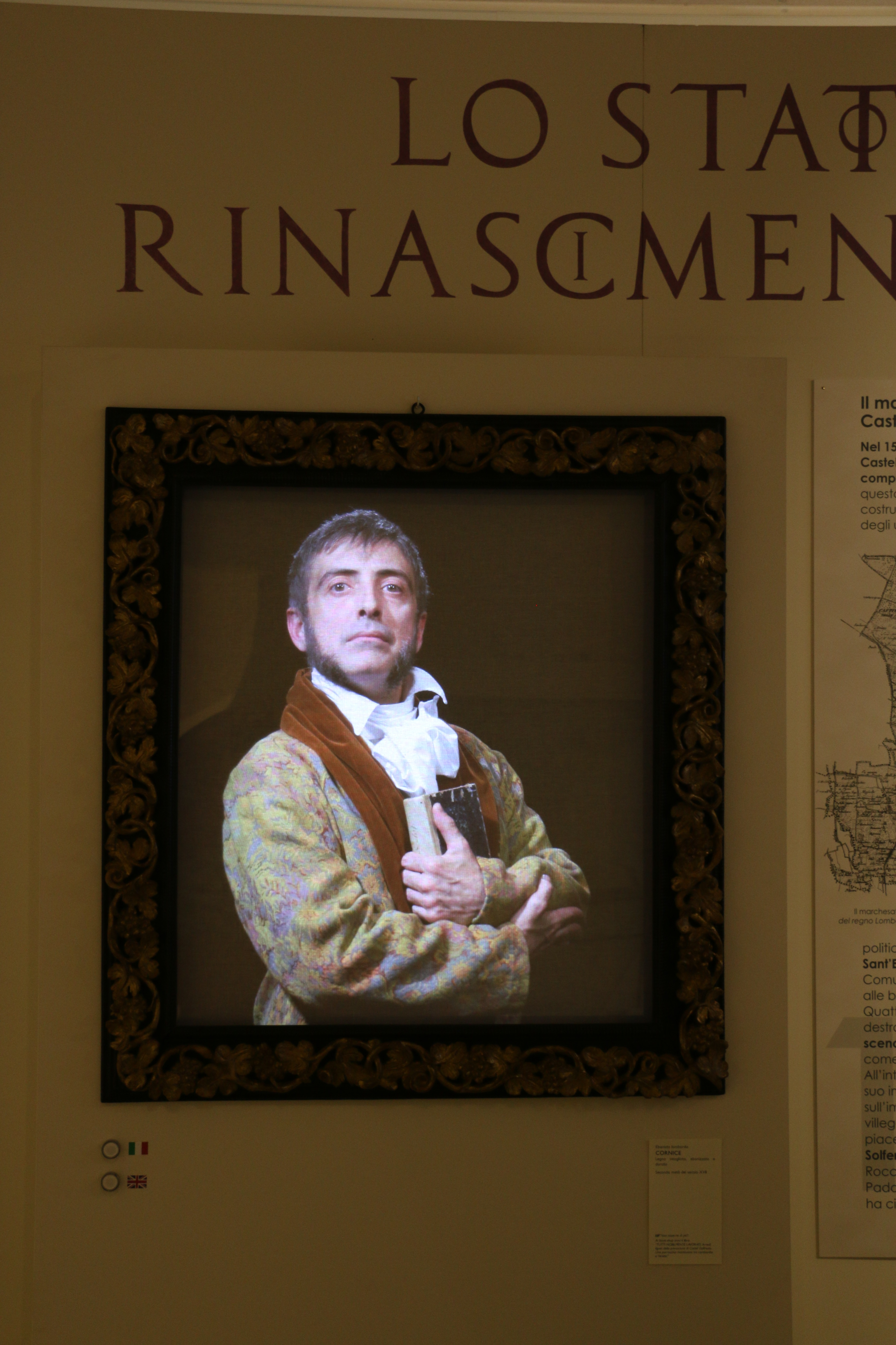 MAST Castel Goffredo-Lo Stato Rinascimentale